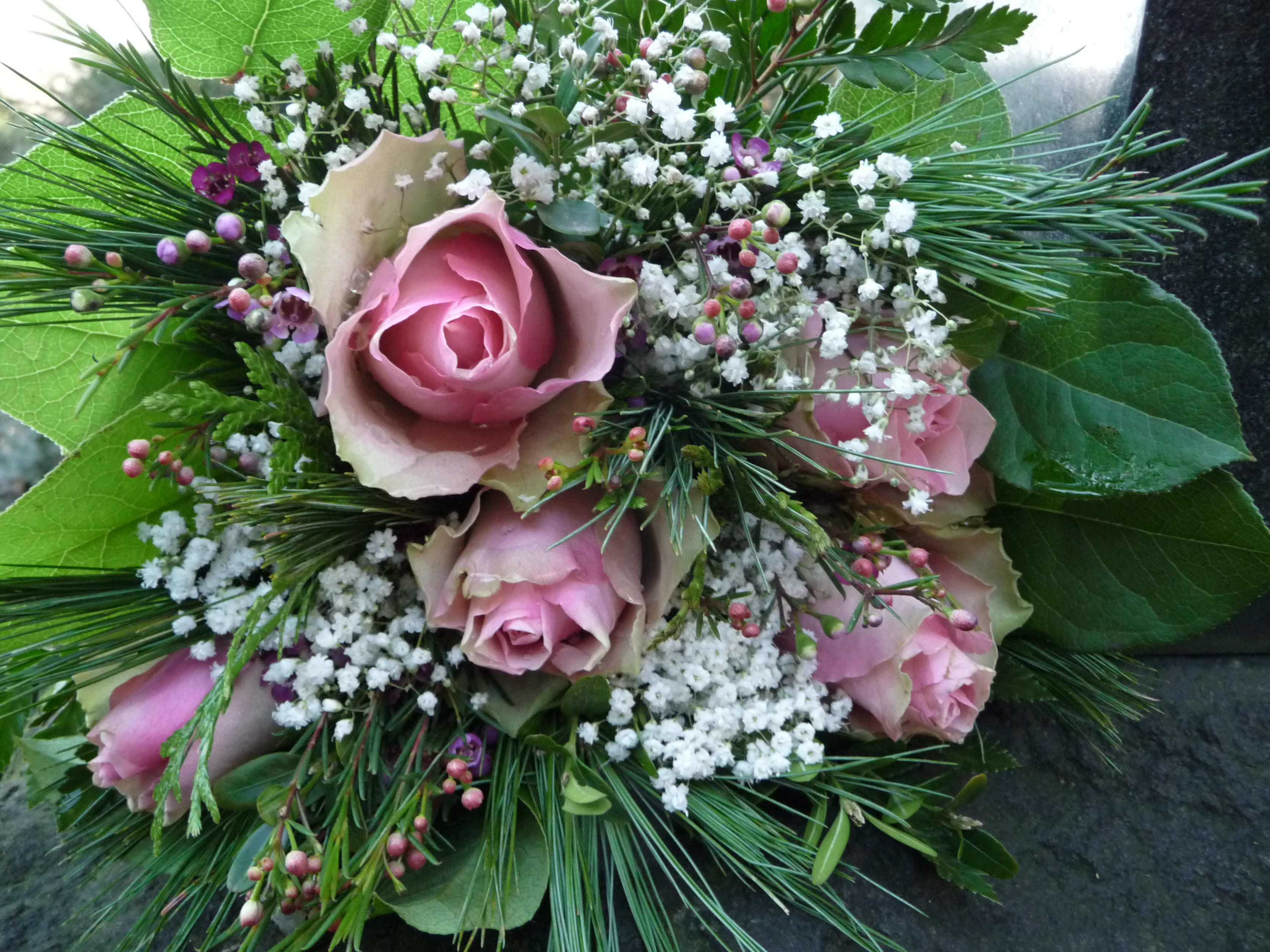 Strauß rosa Rosen (Rosa cultivar) mit Schleierkraut (Gypsophila paniculata)